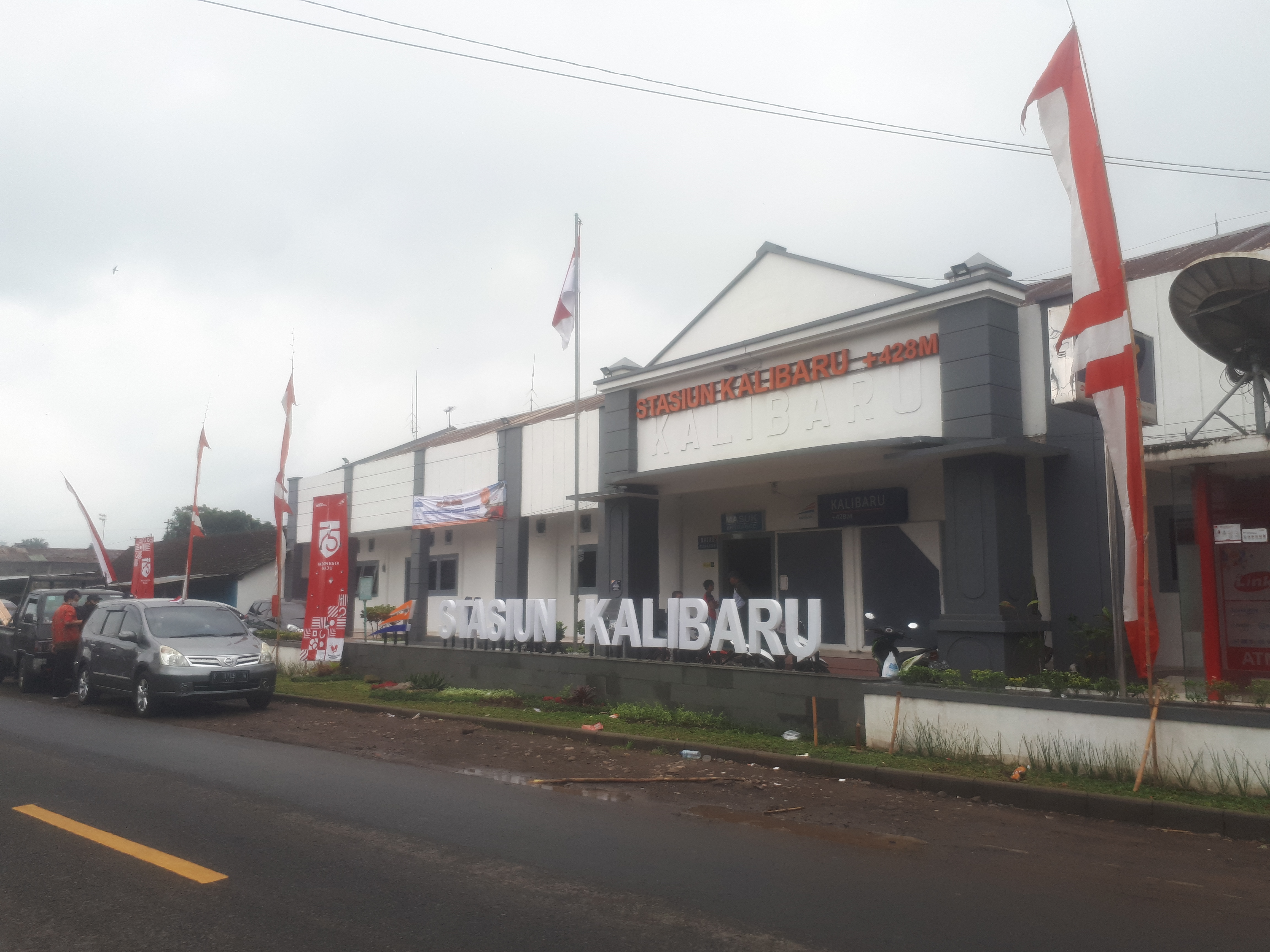 Tampak depan Stasiun Kalibaru, 2020